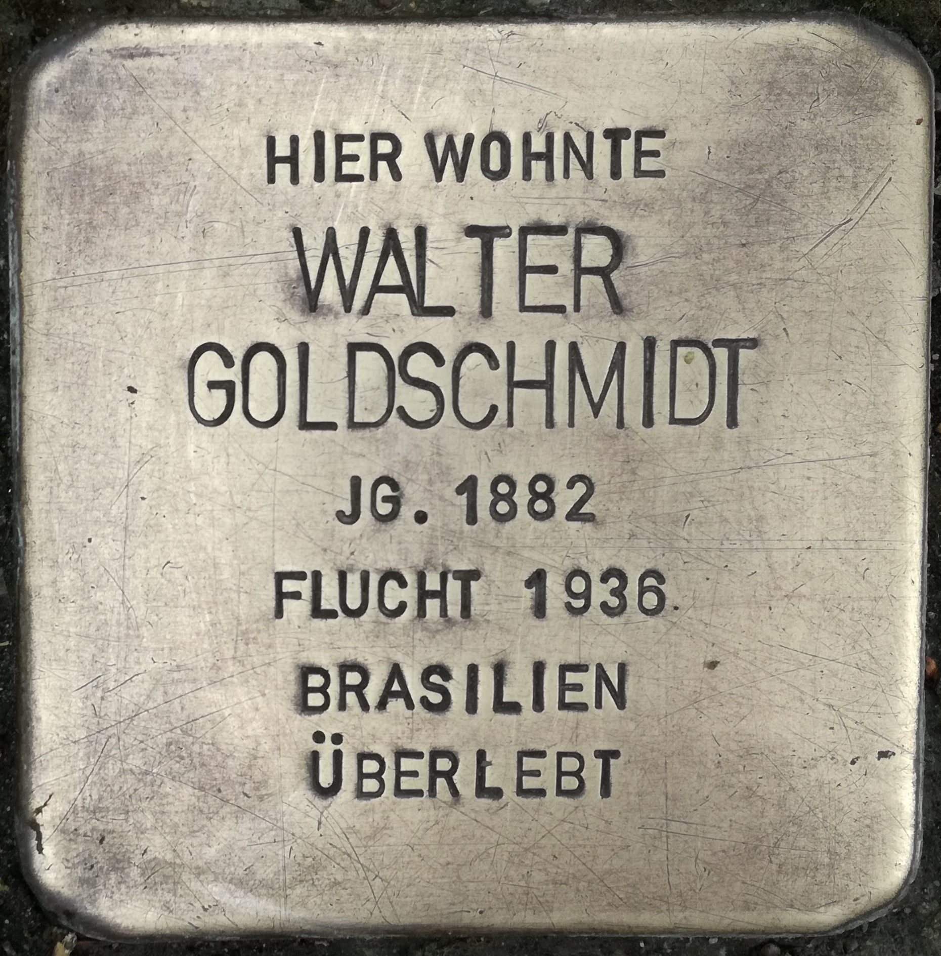 Hier wohnte Walter Goldschmidt Jahrgang 1882 Flucht 1936 Brasilien überlebt